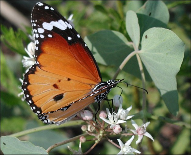 Petit Monarque mâle se nourrissant sur la Scammonée de Montpellier